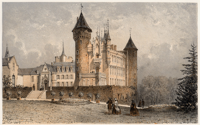 Kolorierte Lithografie des Schlosses Busset